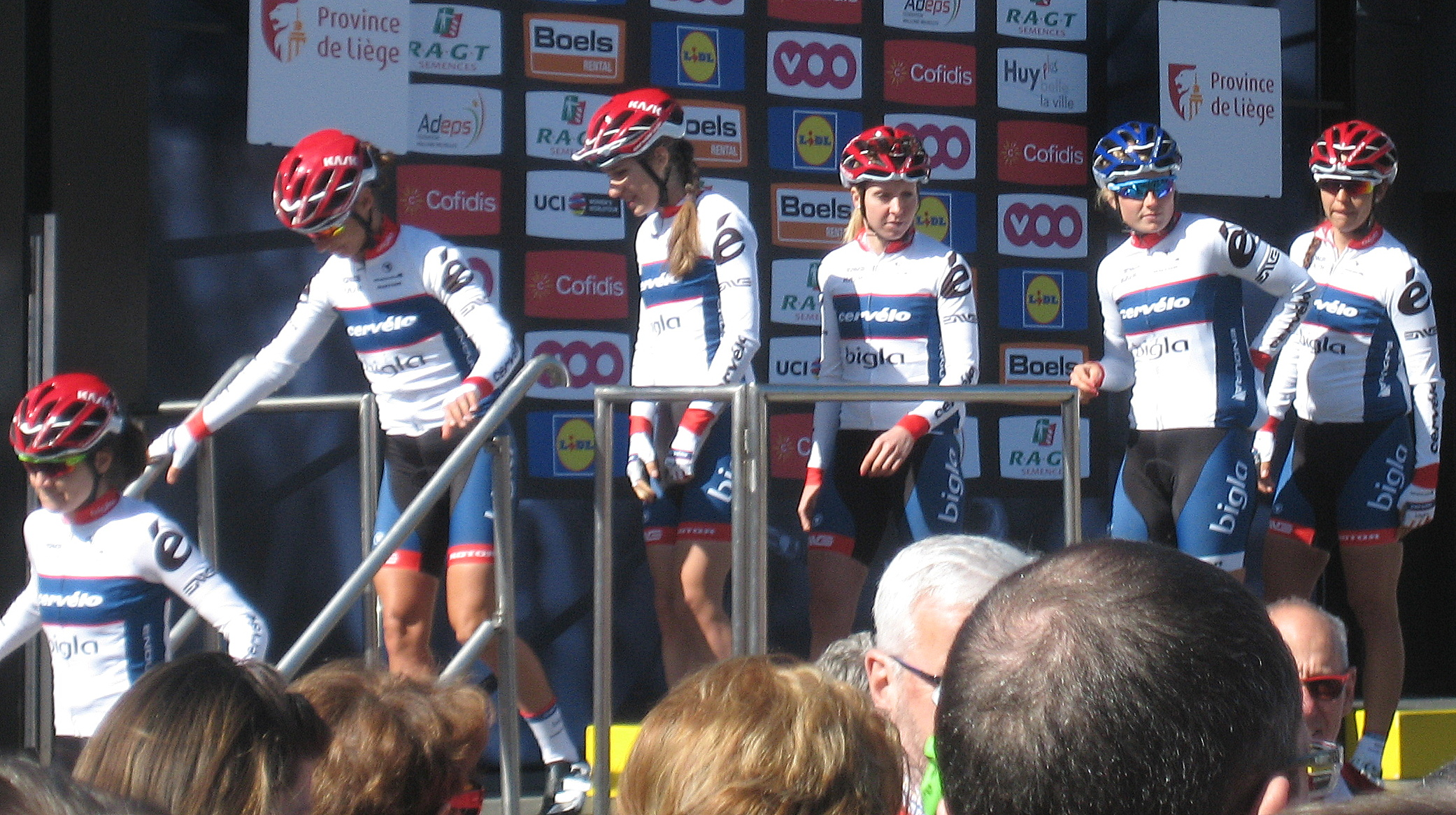 Cervélo-Bigla voor start Waalse Pijl 2016